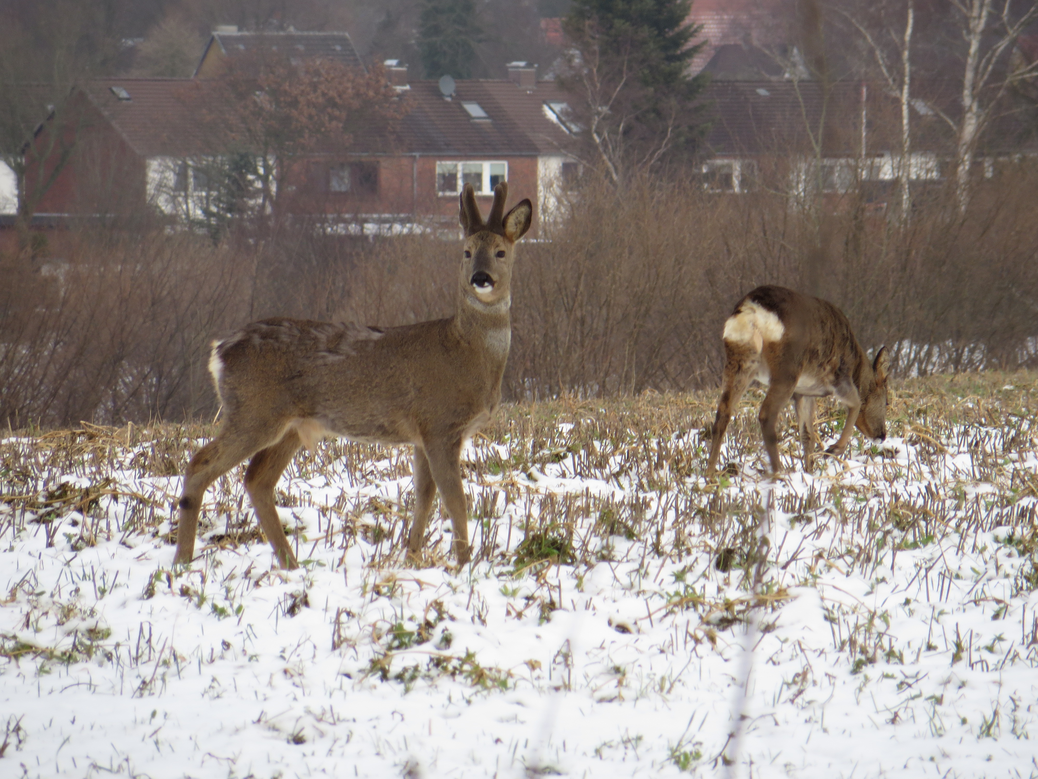 Rehe beim Osbektal am Rande von Engelsby-Dorf (Flensburg-Mürwik Jan 2015), Bild 06